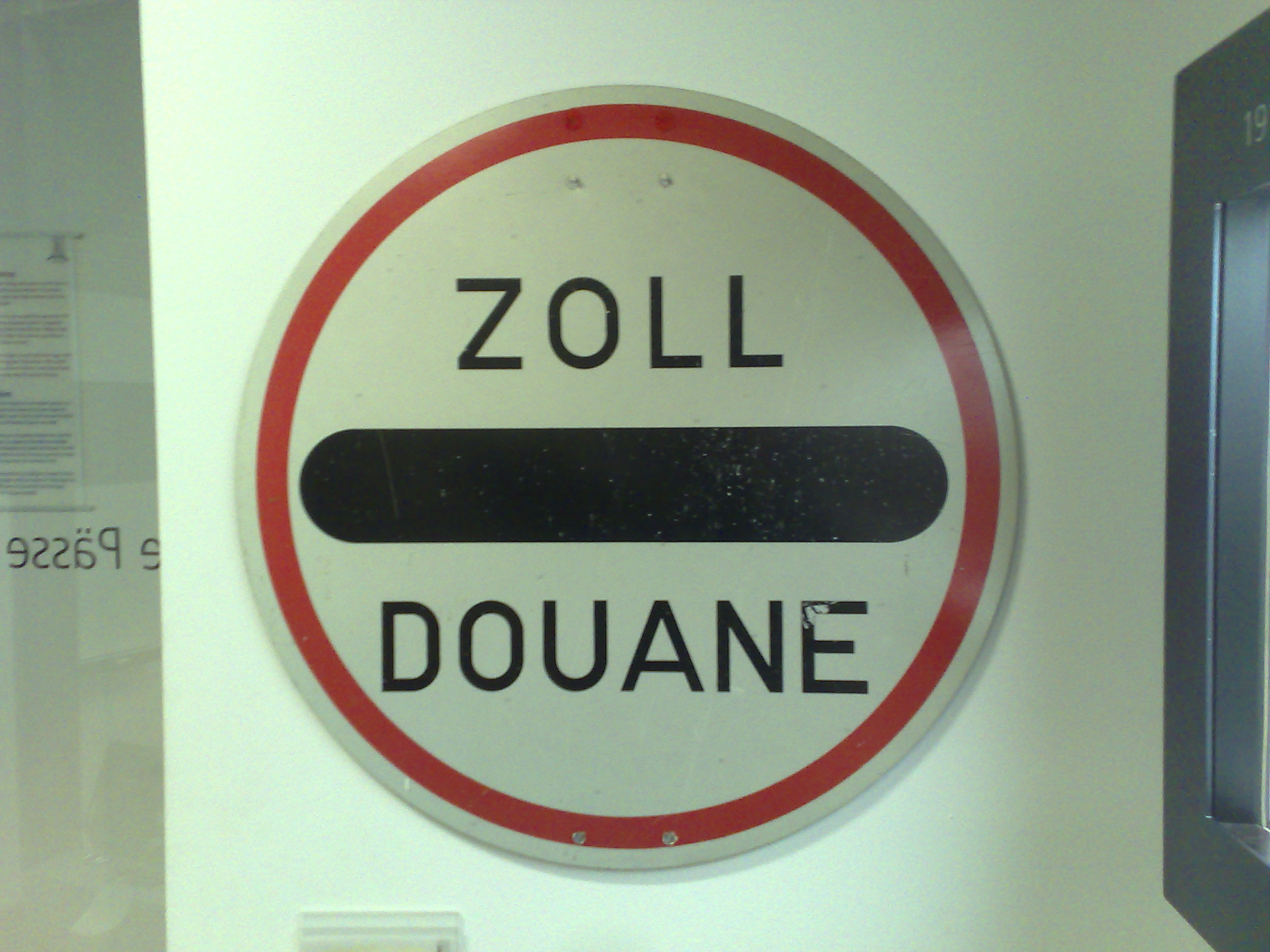 Salah satu koleksi museum ini adalah rambu bea cukai yang menandakan perbatasan antara Prancis dengan Jerman yang dipakai sebelum penerapan zona Schengen